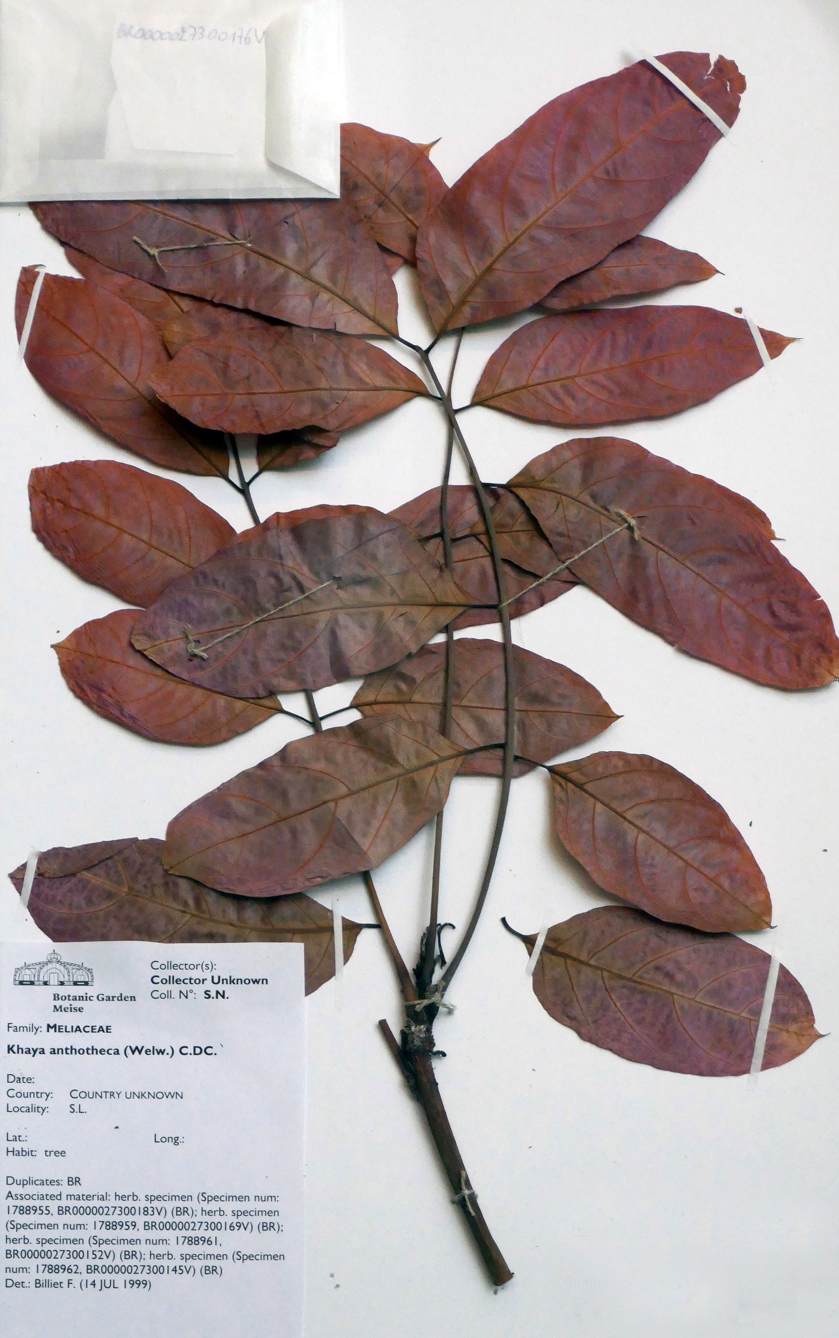 Khaya anthotheca à l'Africa Museum de Tervuren (Belgique). Prêté (?) par le Jardin botanique de Meise.